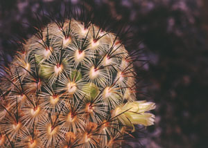 Mammillaria microhelia aus der Sammlung von „Andreae Kakteenkulturen“, Inh. Michael Januschkowetz, Ausserhalb Lengfeld 17, 64853 Otzberg-Lengfeld